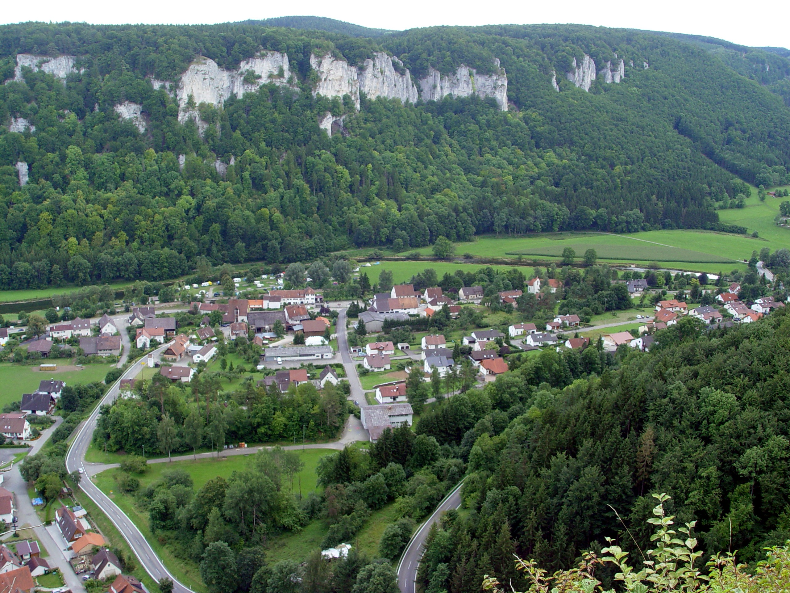 Das Dorf Hausen im Tal, Ortsteil der Gemeinde Beuron in Baden-Württemberg, von der Ruine des Schlosses Hausen aus gesehen (Nordansicht)